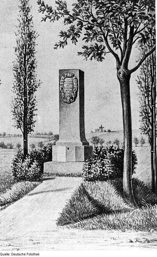 Original image description from the Deutsche Fotothek Wilsdruff-Kaufbach. Gedenkstein an die Schlacht bei Kesselsdorf am 15.12.1745, aus: Über Berg und Tal vom 15.1.1908